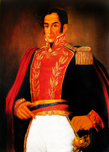 Simon Bolivar Dictador del Perú